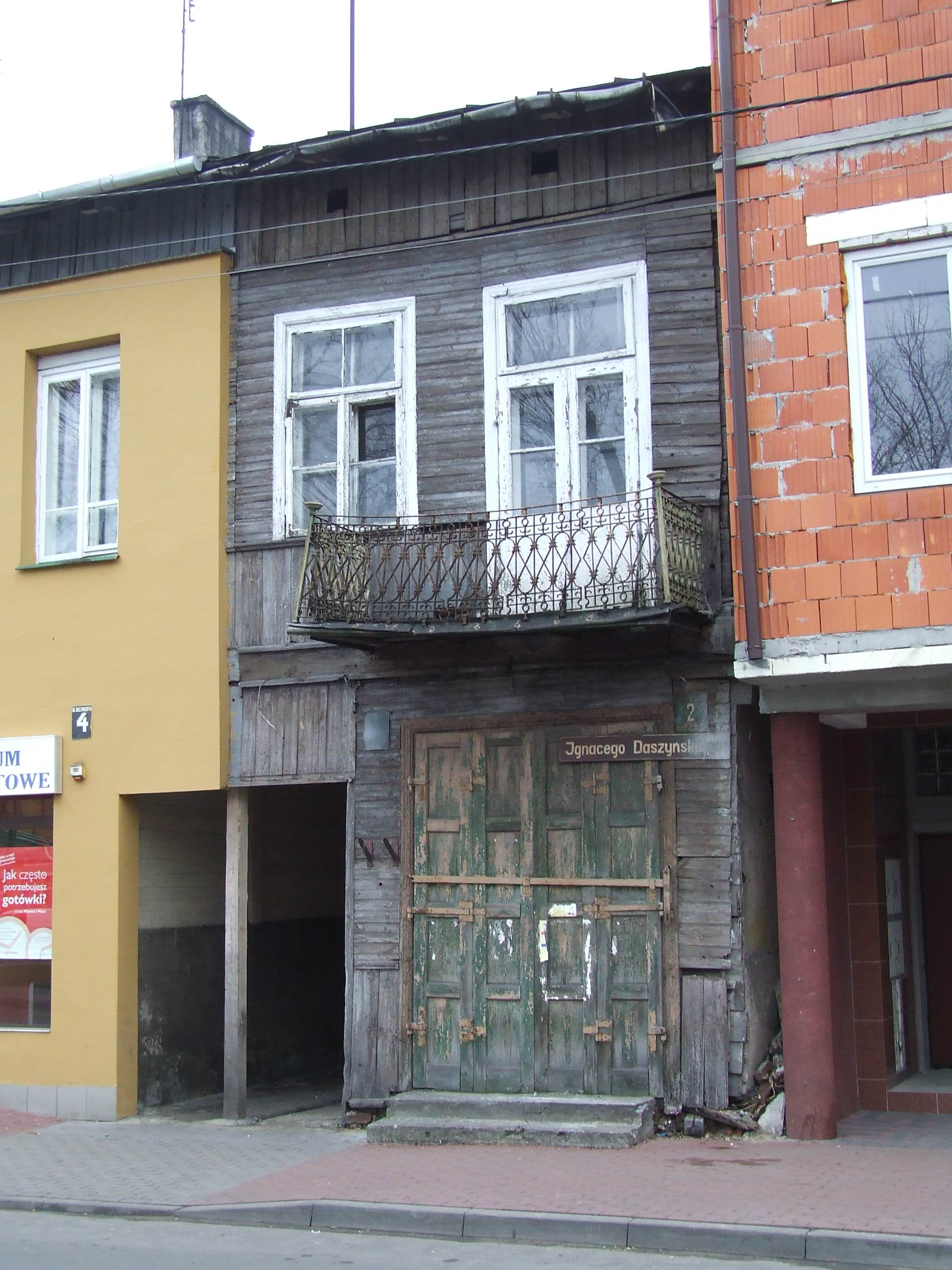 Nowy Dwór Mazowiecki, stary dom